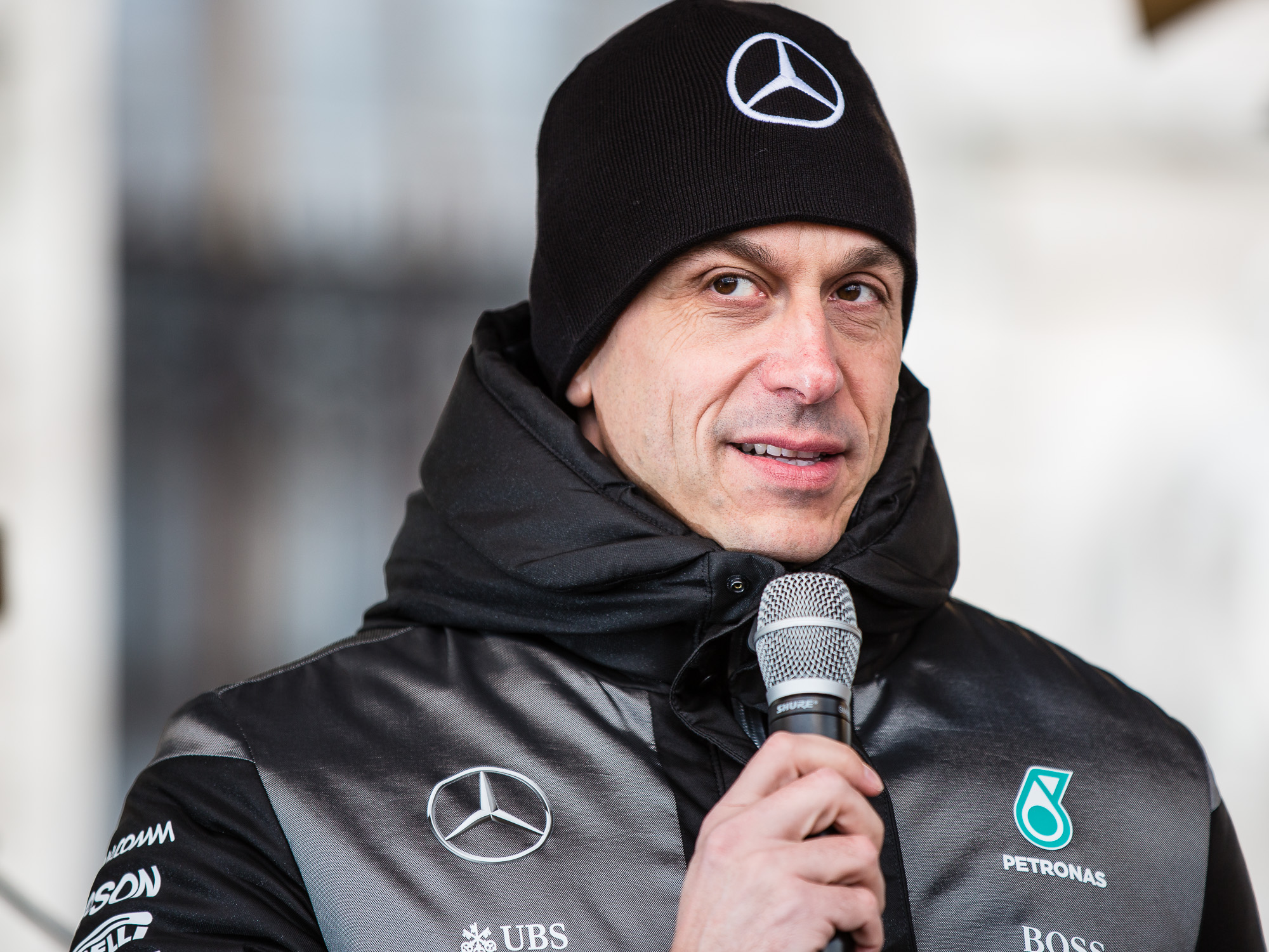 Toto Wolff bei der Publikumsveranstaltung "ÖAMTC Welt des Motorsports" Begleitend zu FIA Gala in der Wiener Hofburg am Freitag, 2. Dezember am Wiener Heldenplatz